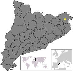 Localització de Figueres. Location of Figueres in Catalonia.